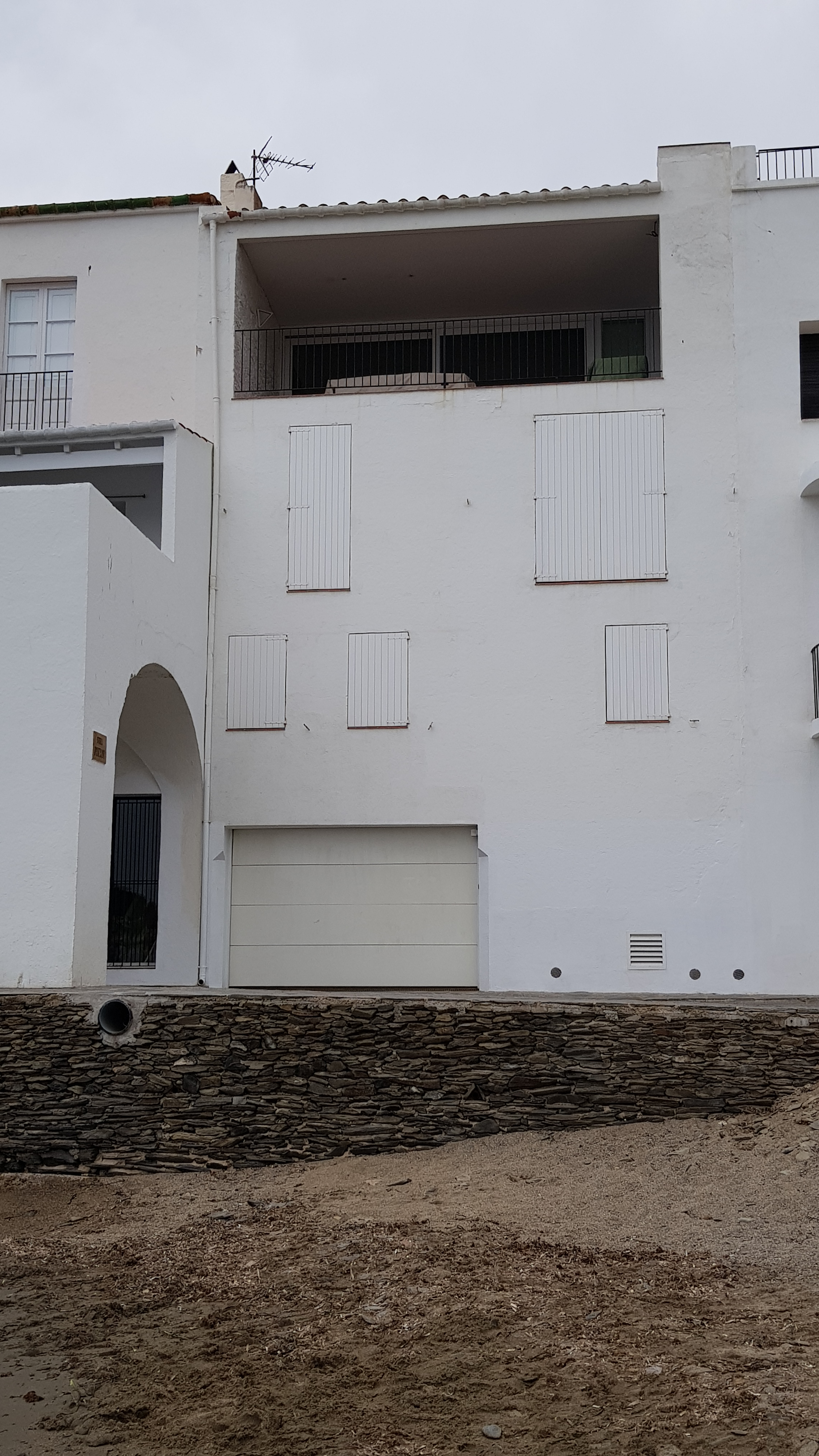 Casa Fradera (Cadaqués)